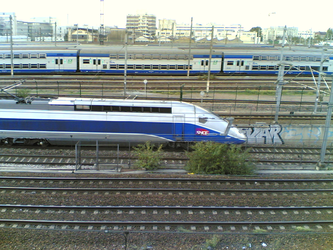 La motrice d'une rame POS et le remisage des V2N au Landy (vue de la gare Stade de France St Denis